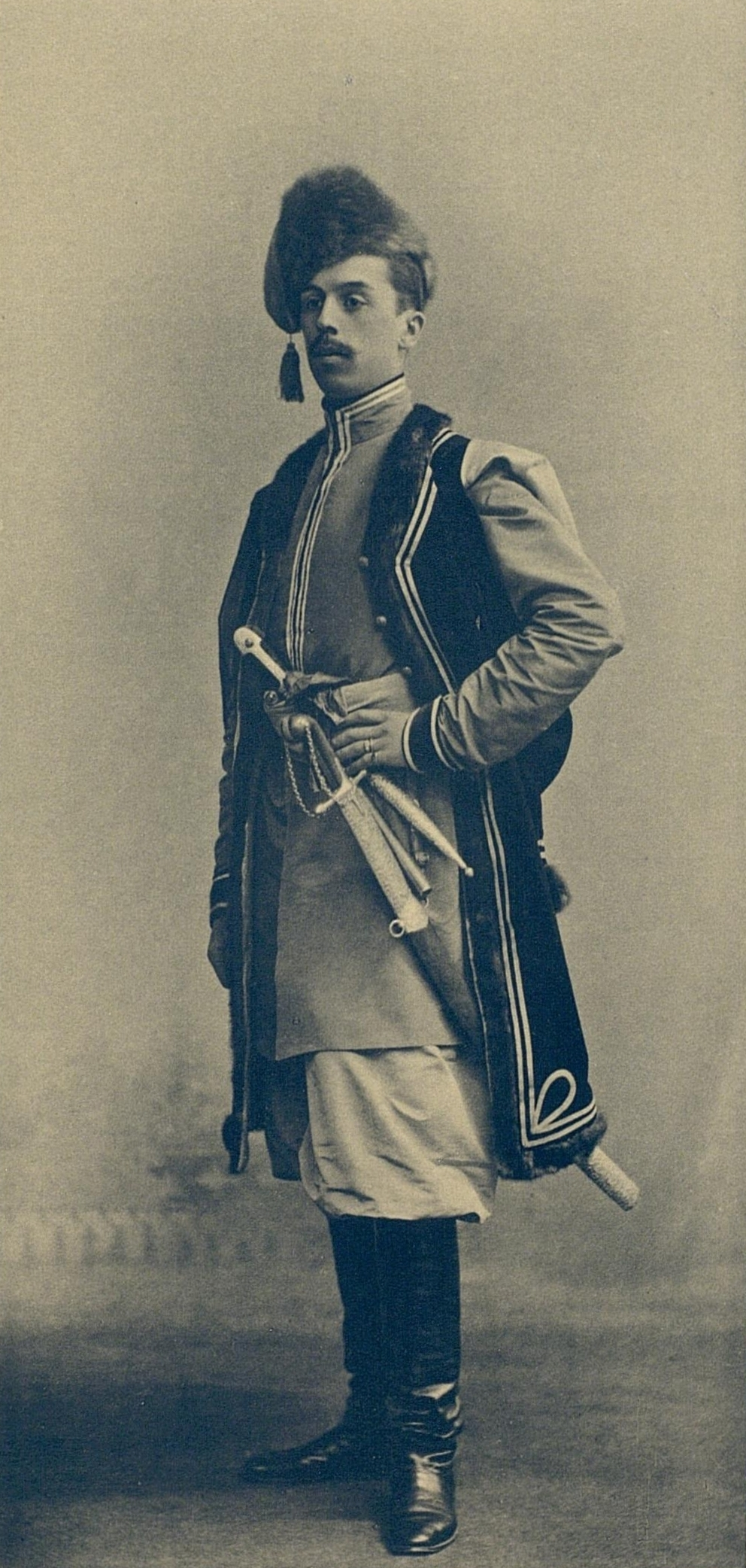 Корнет лейб-гвардии Конногренадерского полка Александр Васильевич Короченцов (хорунжий Ахтырского Слободского казачьего полка 1680 г.)